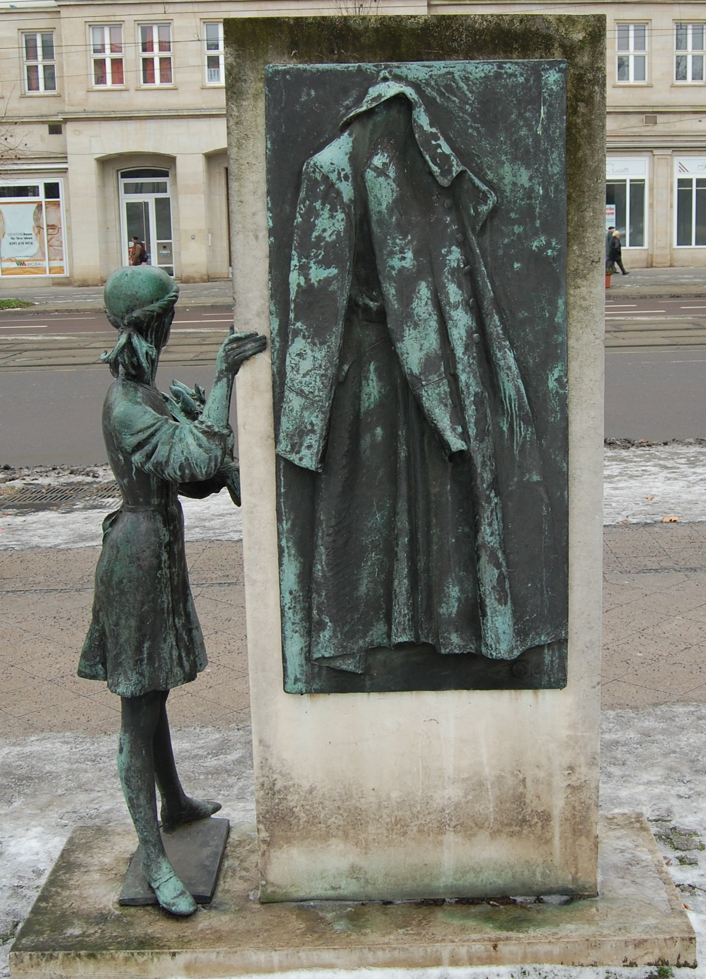 Plastik "Die Rettungstat des Hauptmanns Belikow" in Magdeburg, Vorderseite